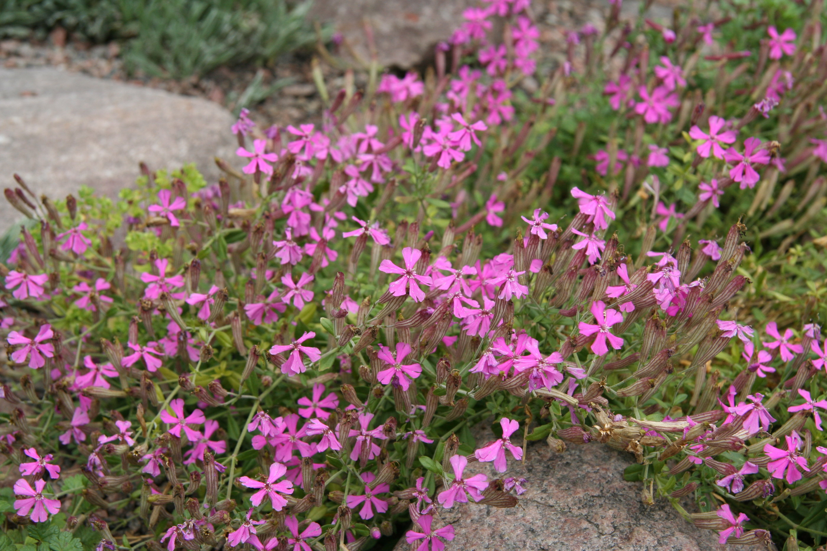 Silene schafta im Botanischen Garten Kopenhagen